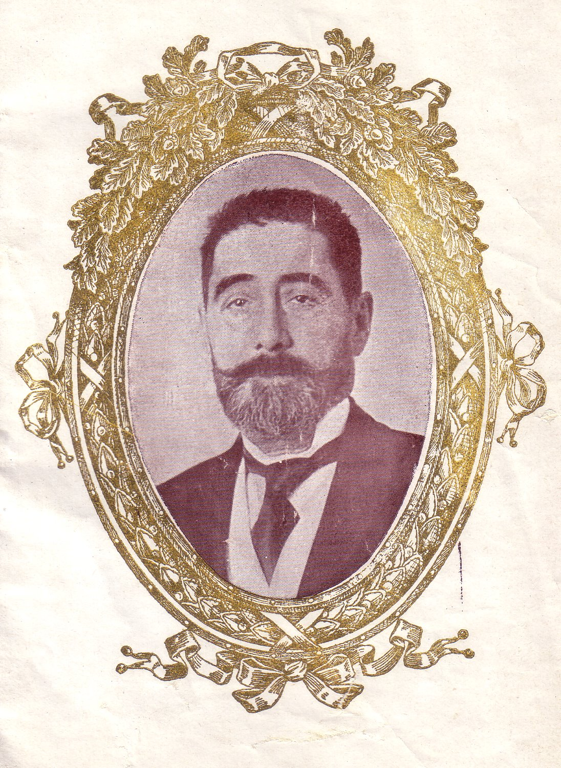 retrato de Don Toribio Fernández Morales